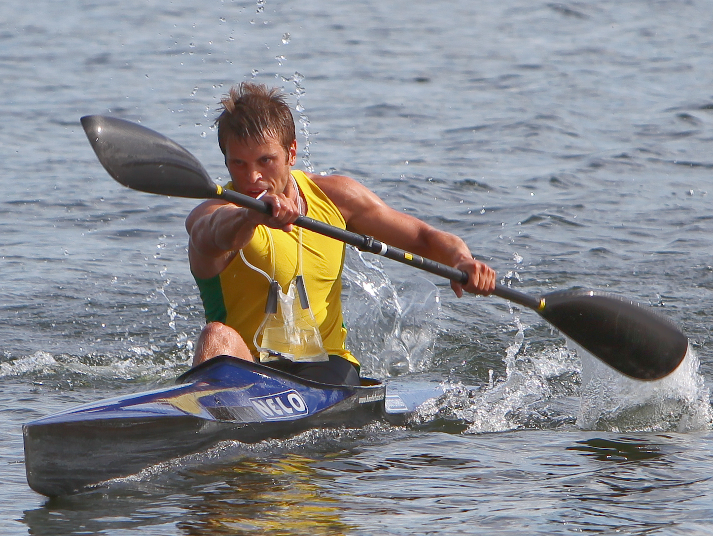 Björn Granstedt, guldmedaljör, Maraton Kanot SM 2009 i Vaxholm